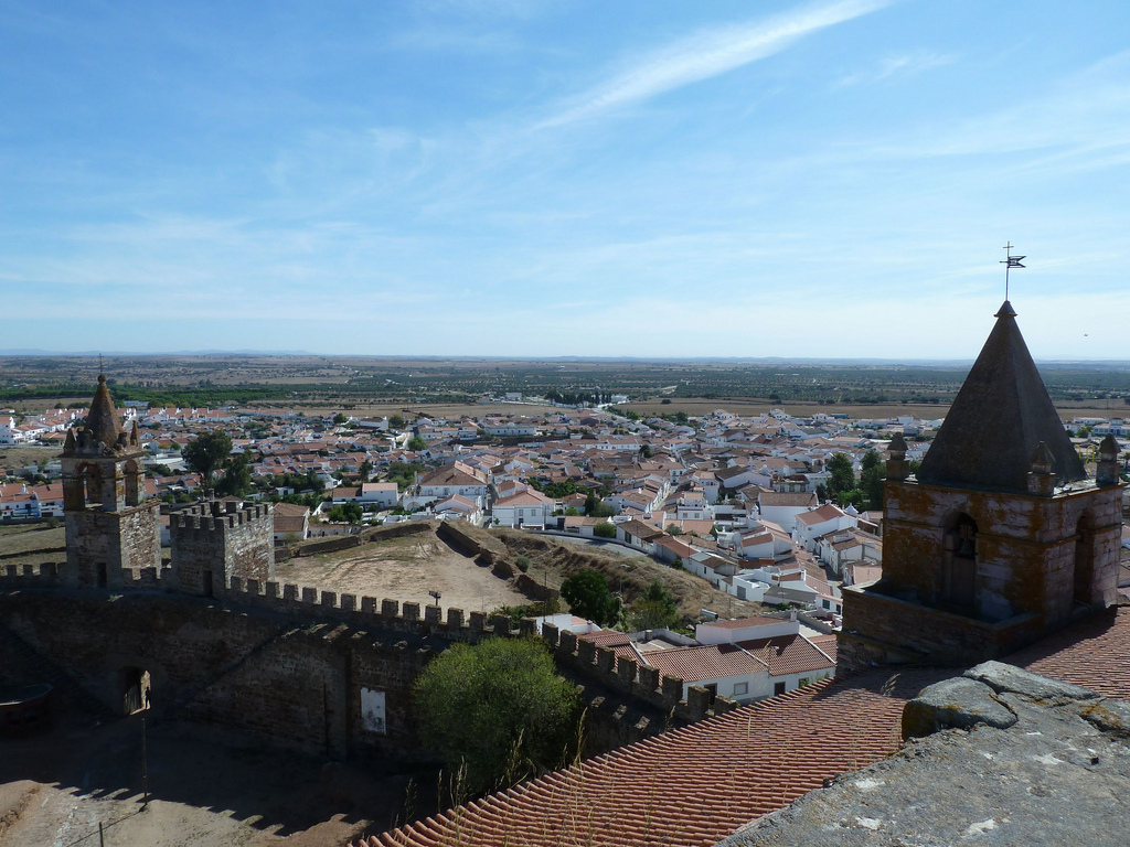 Castillo_de_Mourao_03